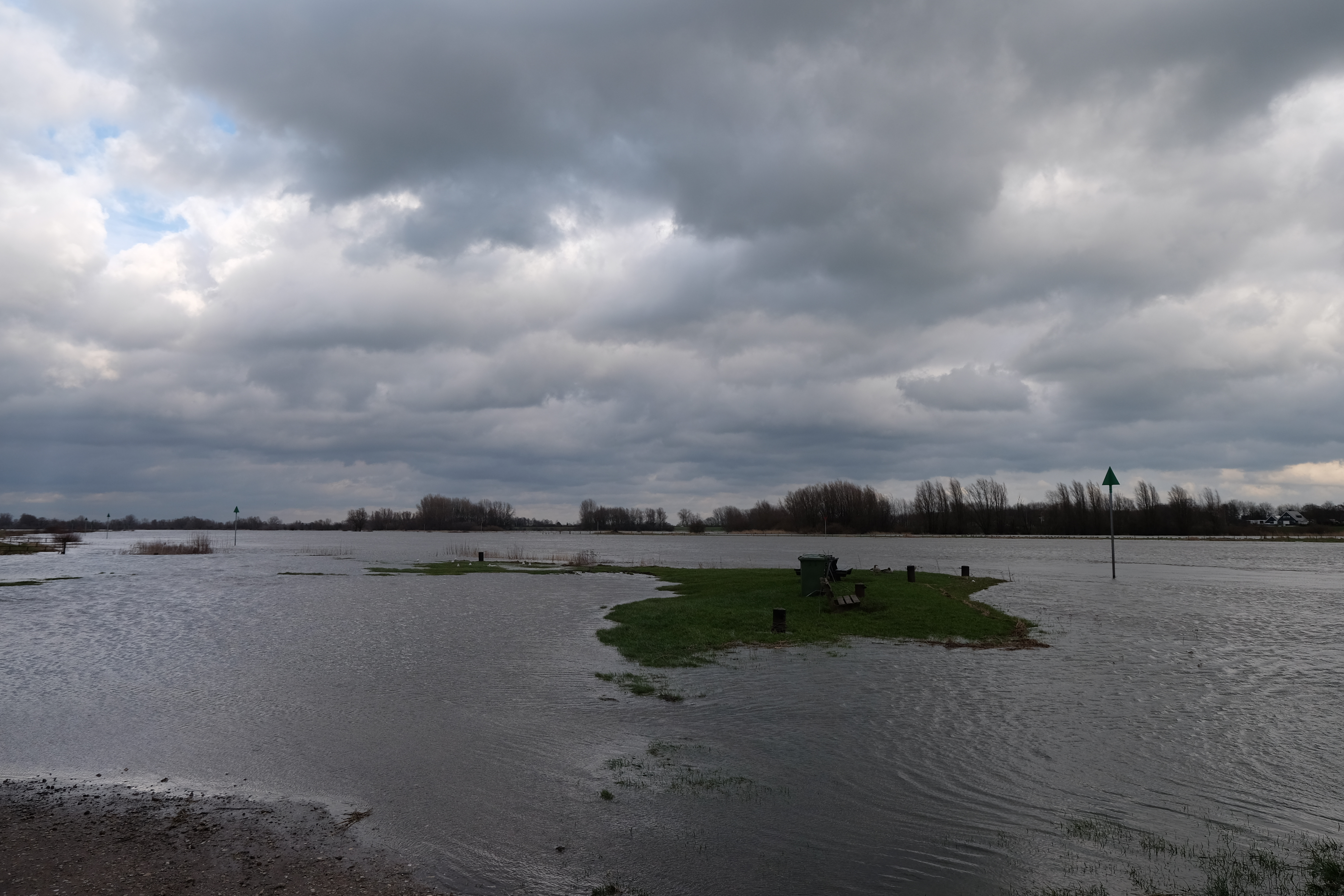 8193 Vorchten, Netherlands